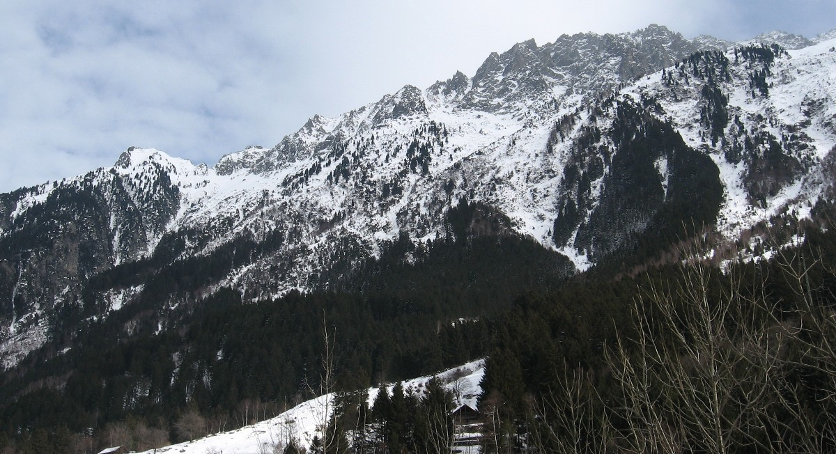 Links Schwarz Berg, mitte Bächenstock, rechts Diederberg